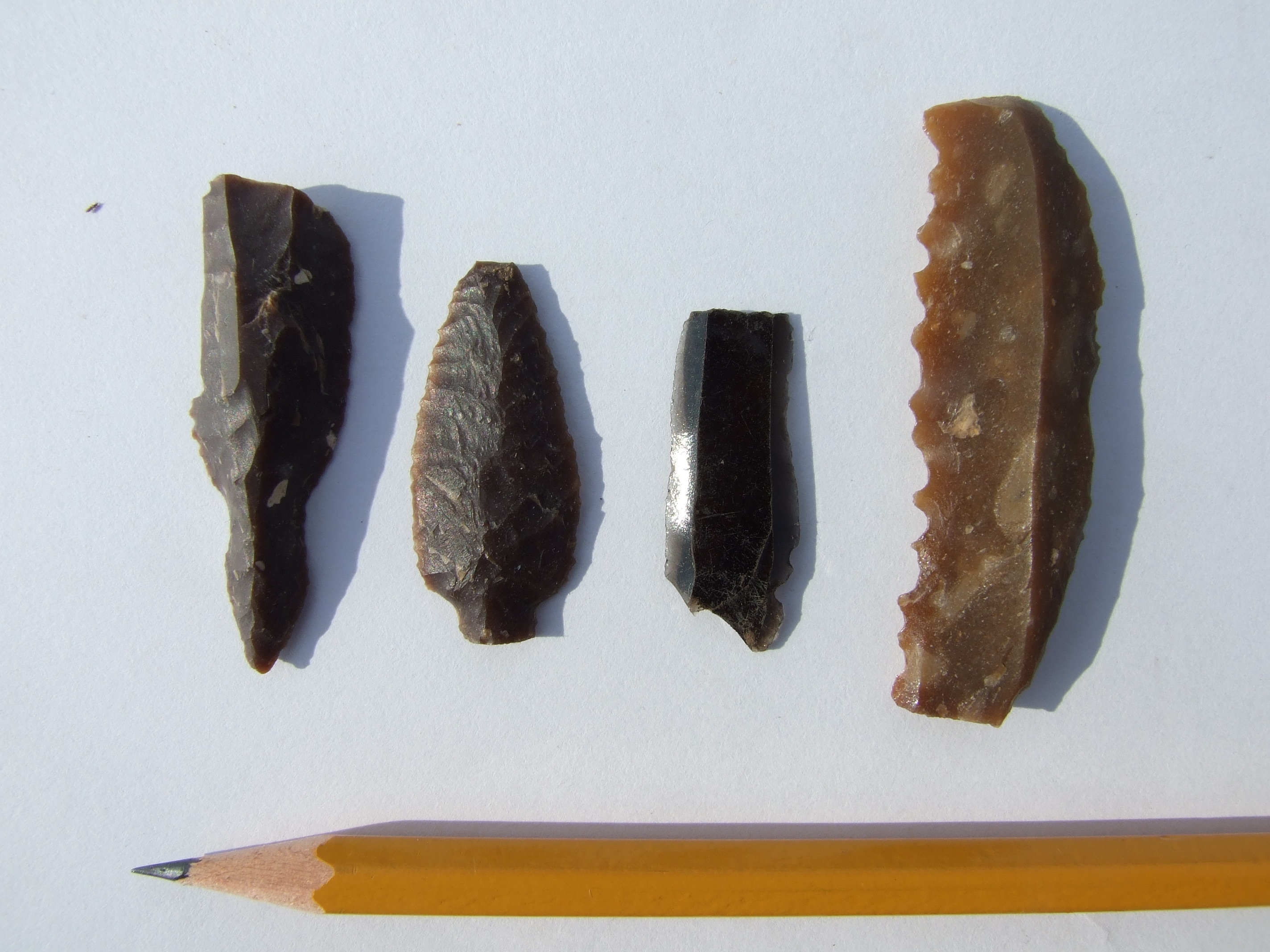 כלי צור - להב מגל, אובסידיאן וראשי- חץ משכבה - אתר ארכאולוגי הגושרים VI